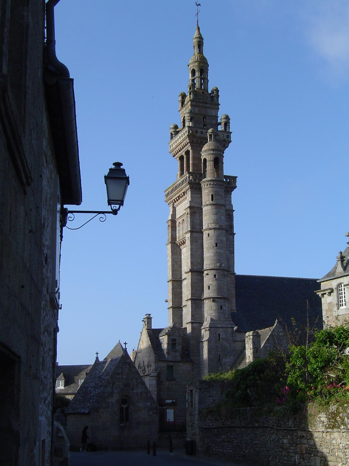 Clocher de l'église de Roscoff.